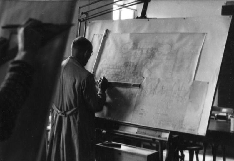 ADN-ZB/Illus-Heinscher Ein volkseigener Betrieb arbeitet für die Landwirtschaft. Die Fahrzeugbauwerke Schönebeck/Elbe arbeiten nach ihrem Wiederaufbau landwirtschaftliche Raupenschlepper für die Landwirtschaft, die der gesamten Ostzone zugute kommen. In der Hauptsache werden Reparaturen ausgeführt. UBz: Das technische Büro leitet alle Produktionsaufgaben sowie den Aufbau des Betriebes. 1559-48